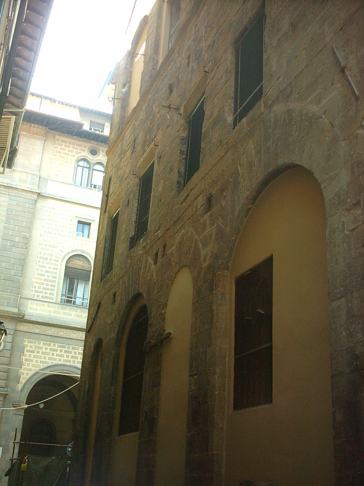 Antica sede dell'Arte dei Medici e Speziali posta tra Via Pellicceria e la chiesa di San Miniato tra le Torri a Firenze